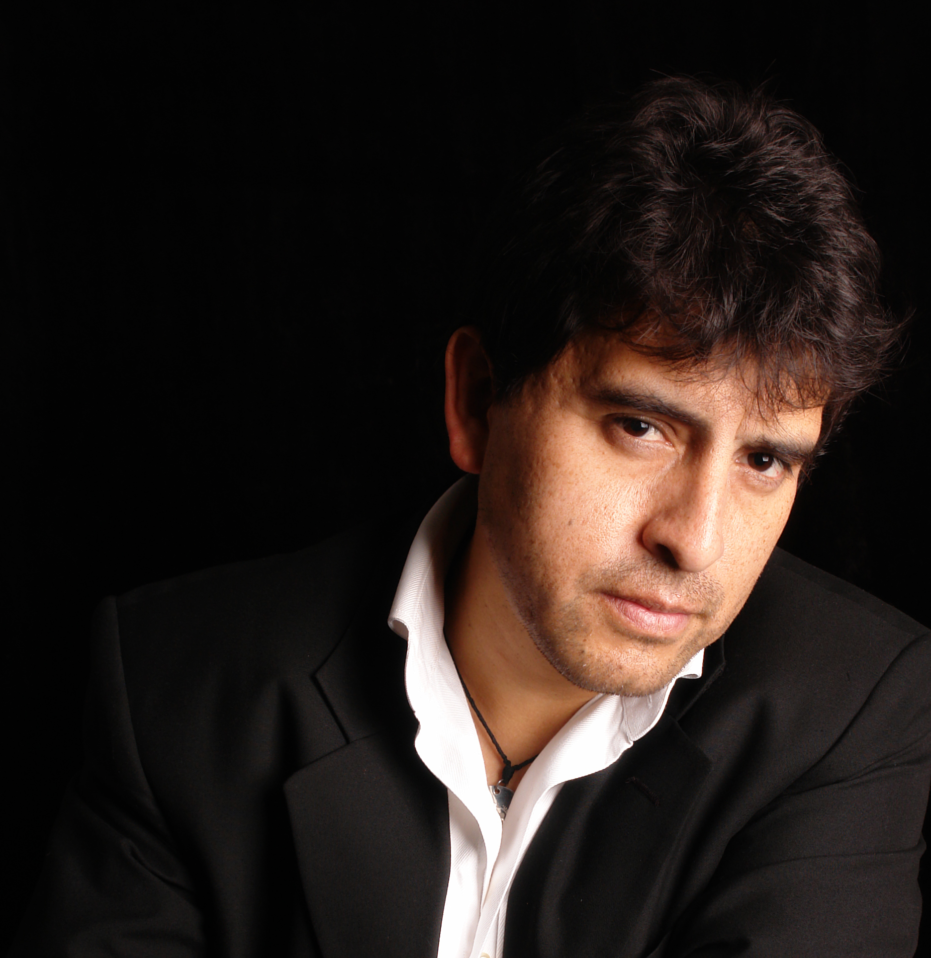 yo